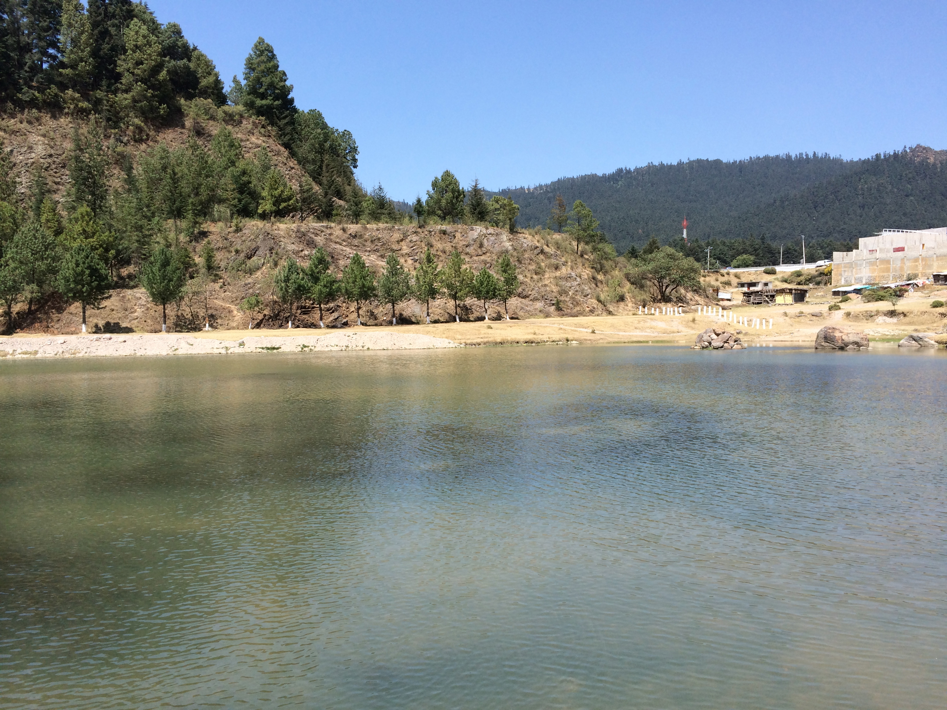 La marquesa caballerizas y lago